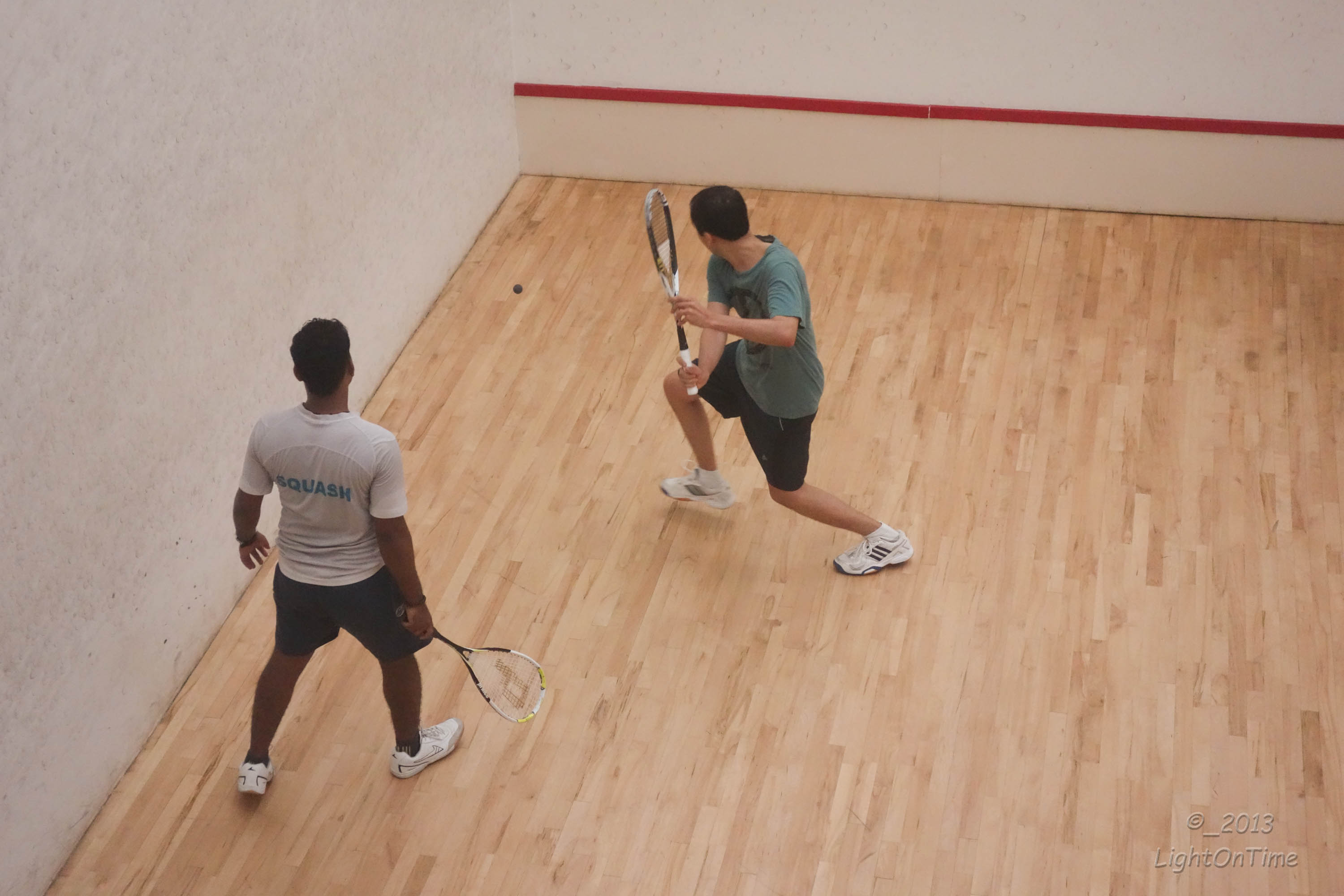 Squash@Jolly Gymkhana,Mumbai-86